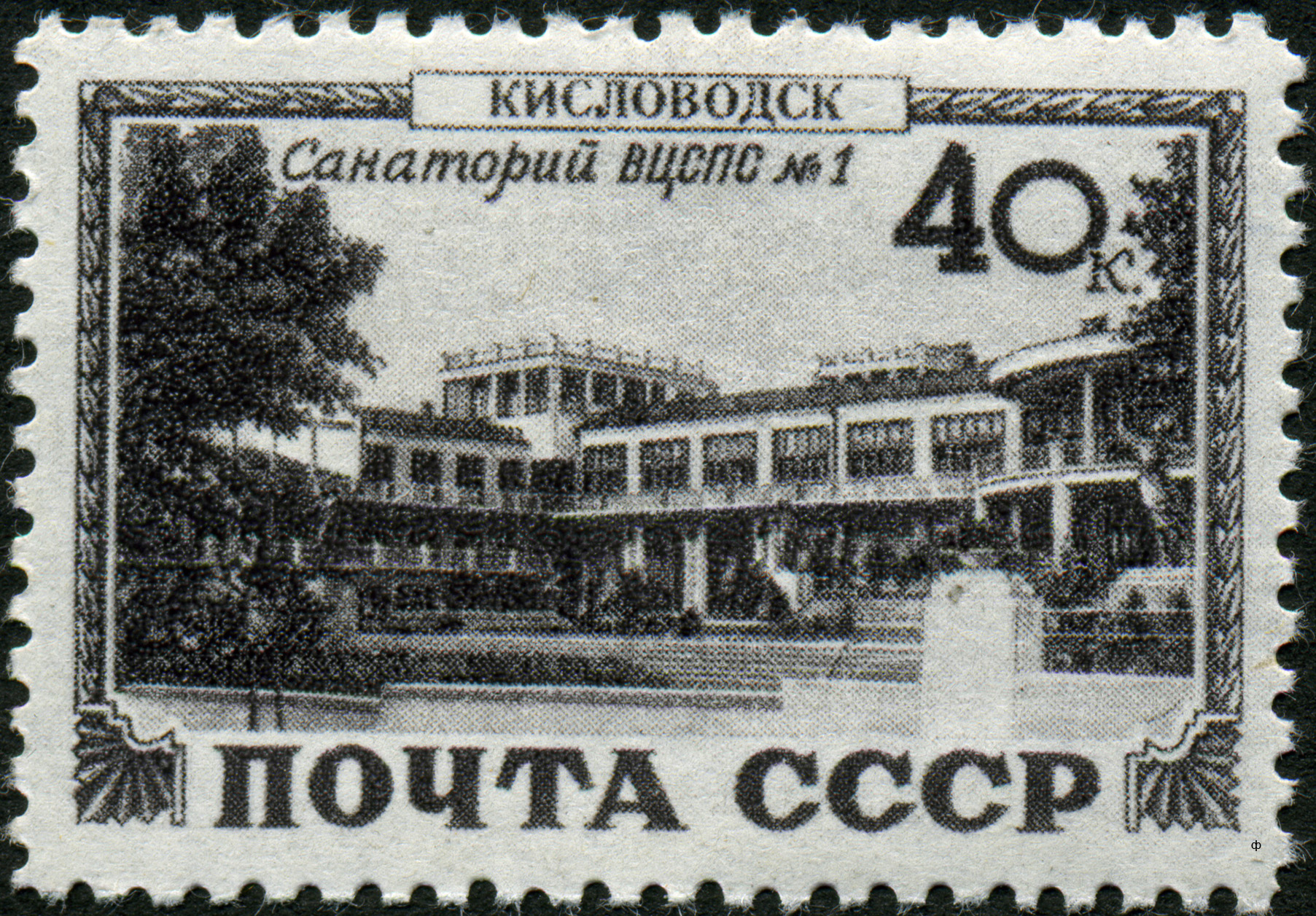 Марка СССР